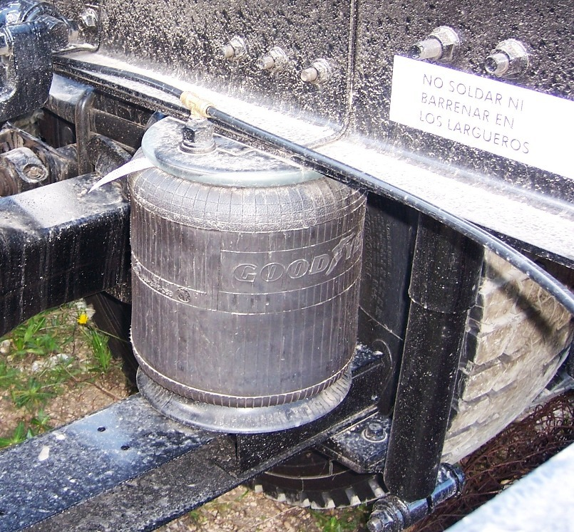 Parte del sistema de suspensión de un camión.